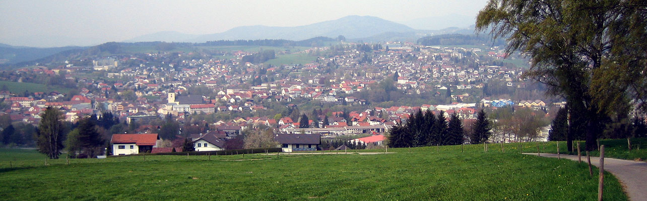 Ansicht von der Stadt Regen